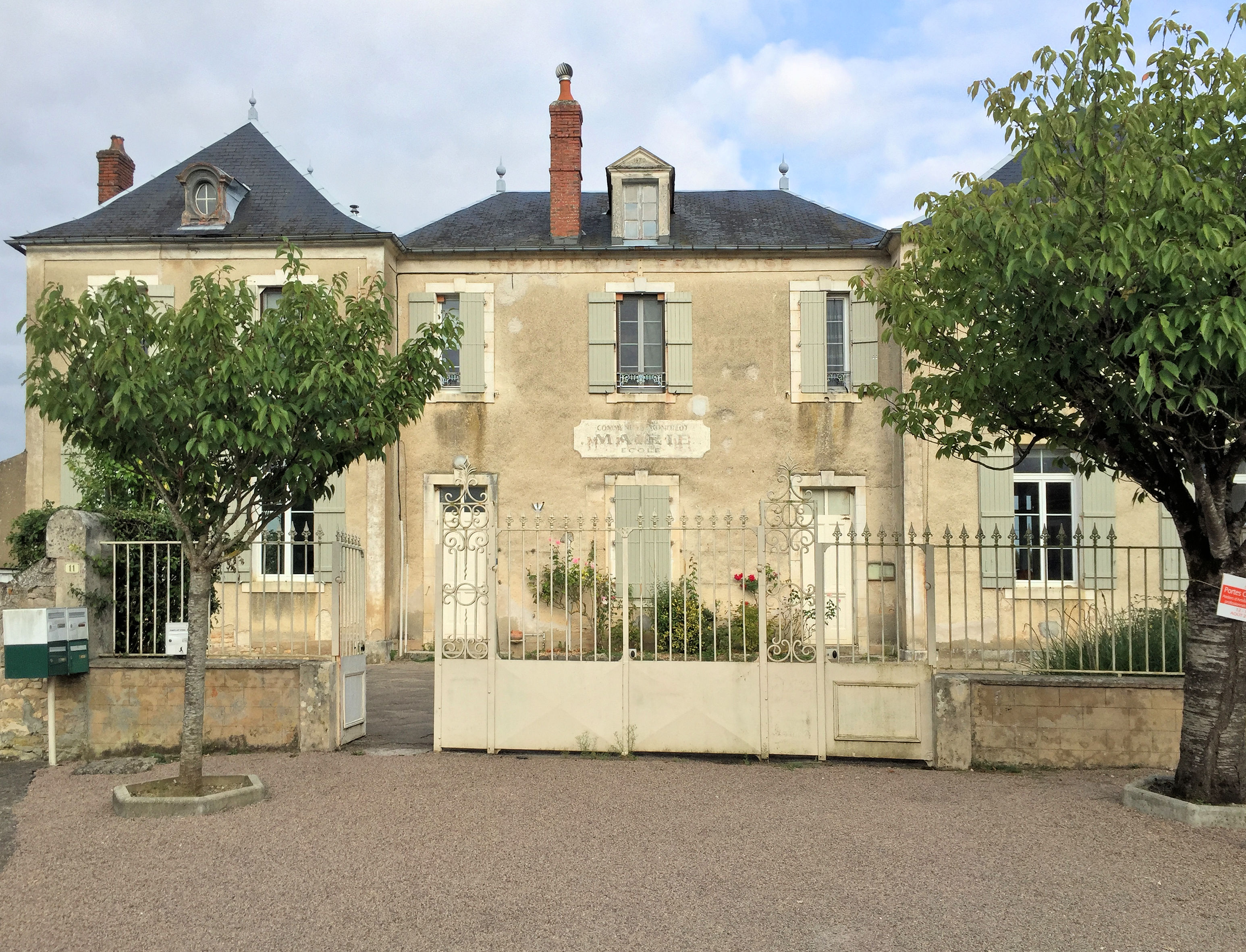 Mairie de Montillot dans l'Yonne